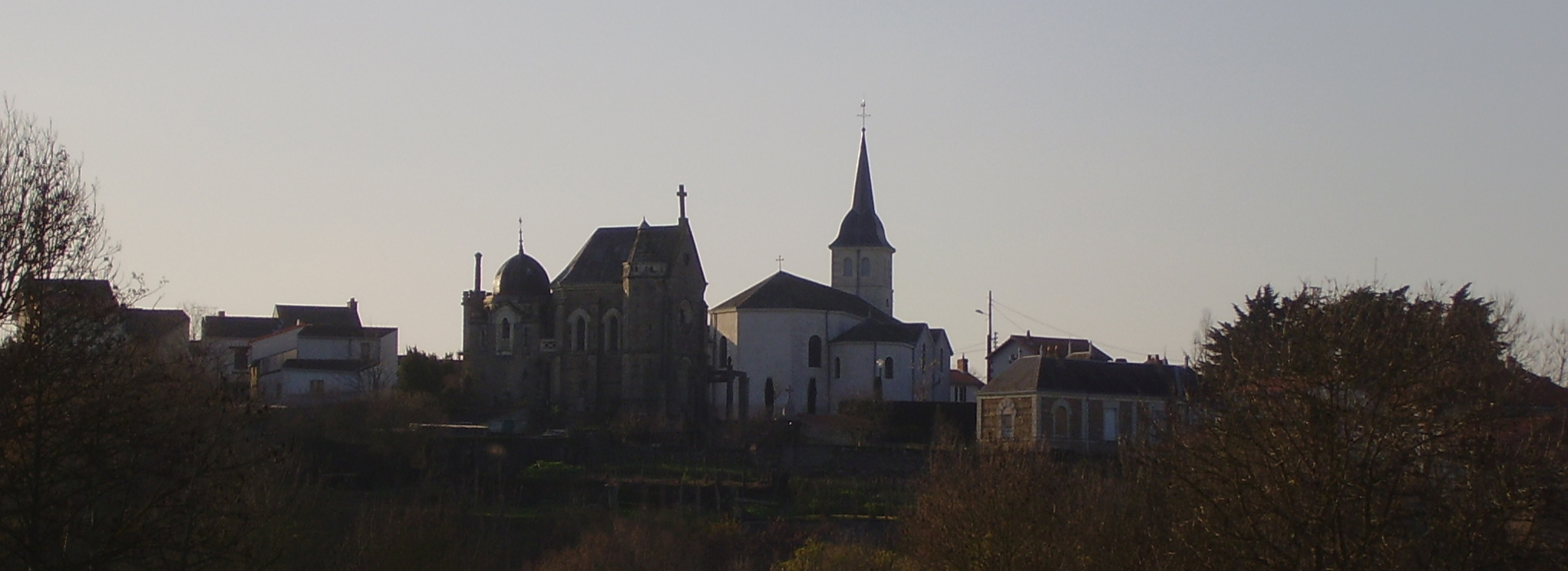 Vue de la commune de Remouillé depuis la route départemantale 137